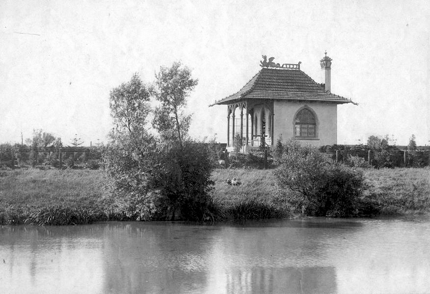 Kontorhaus am Jödebrunnen in Braunschweig von 1899. Das Haus wurde als Kontorhaus gebaut und als Büro und Freizeitpavillon genutzt. Im Vordergrund ist der Jödebrunnen zu sehen. Im Haus ist ein Kaminspruch: "Kämpfe, strebe, aber lebe - schaffe, ringe, aber singe".